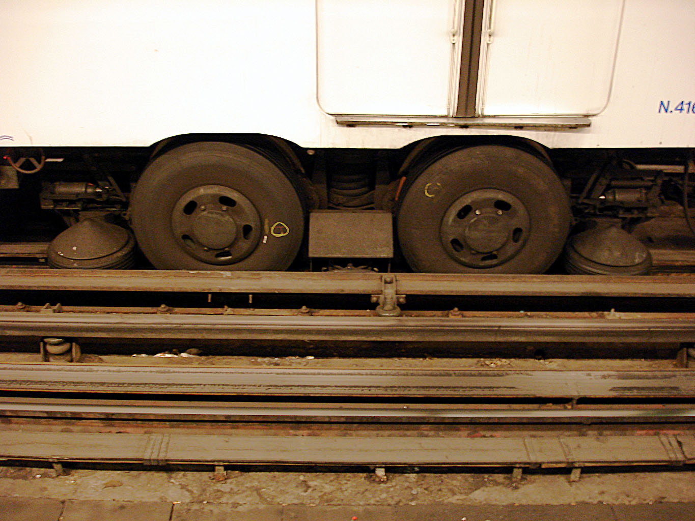 Roulement sur pneus, MP 59 de la ligne 11 du métro de Paris, France.